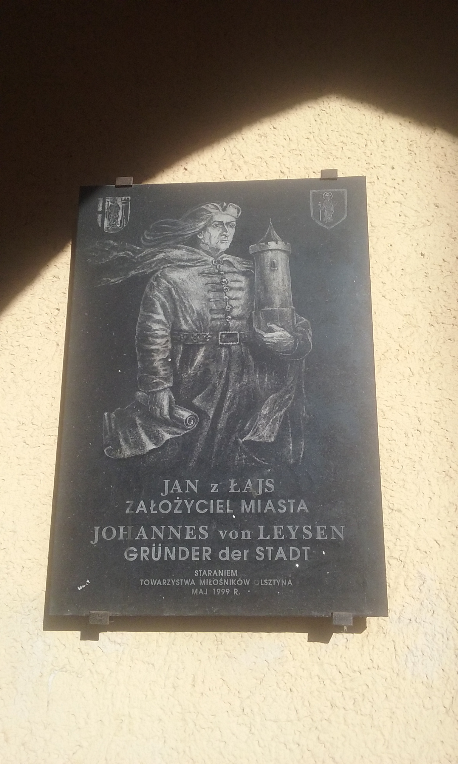 Tablica upamiętniająca Jana z Łajs, zasadźcę i pierwszego sołtysa Olsztyna. Arkady tzw. Domu Burmistrza, ul. Stare Miasto 11. Na ścianie cień łuku gotyckiego. Na tablicy znajduje się błąd, ponieważ Jan nie był "założycielem Olsztyna", była nim kapituła warmińska.